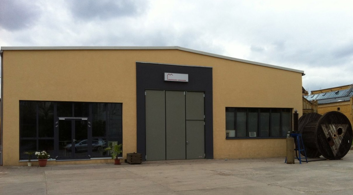 Industriesalon Schöneweide e.V. - Museum für Industriekultur